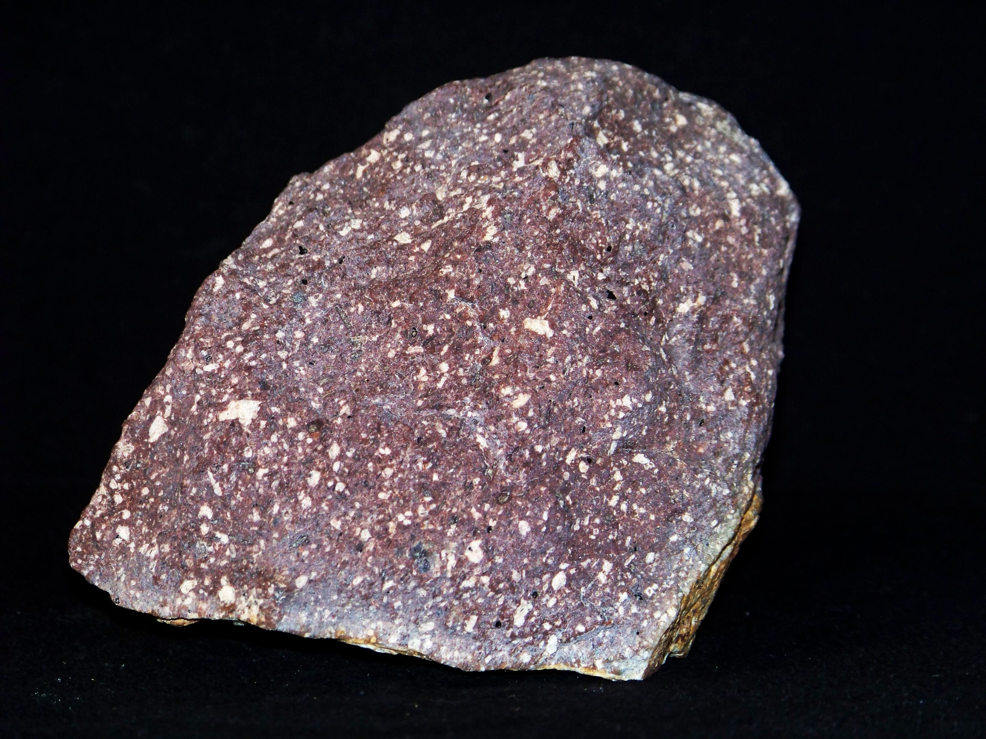 Porfir bezkwarcowy, k. Zalas, okolice Krakowa, POlska